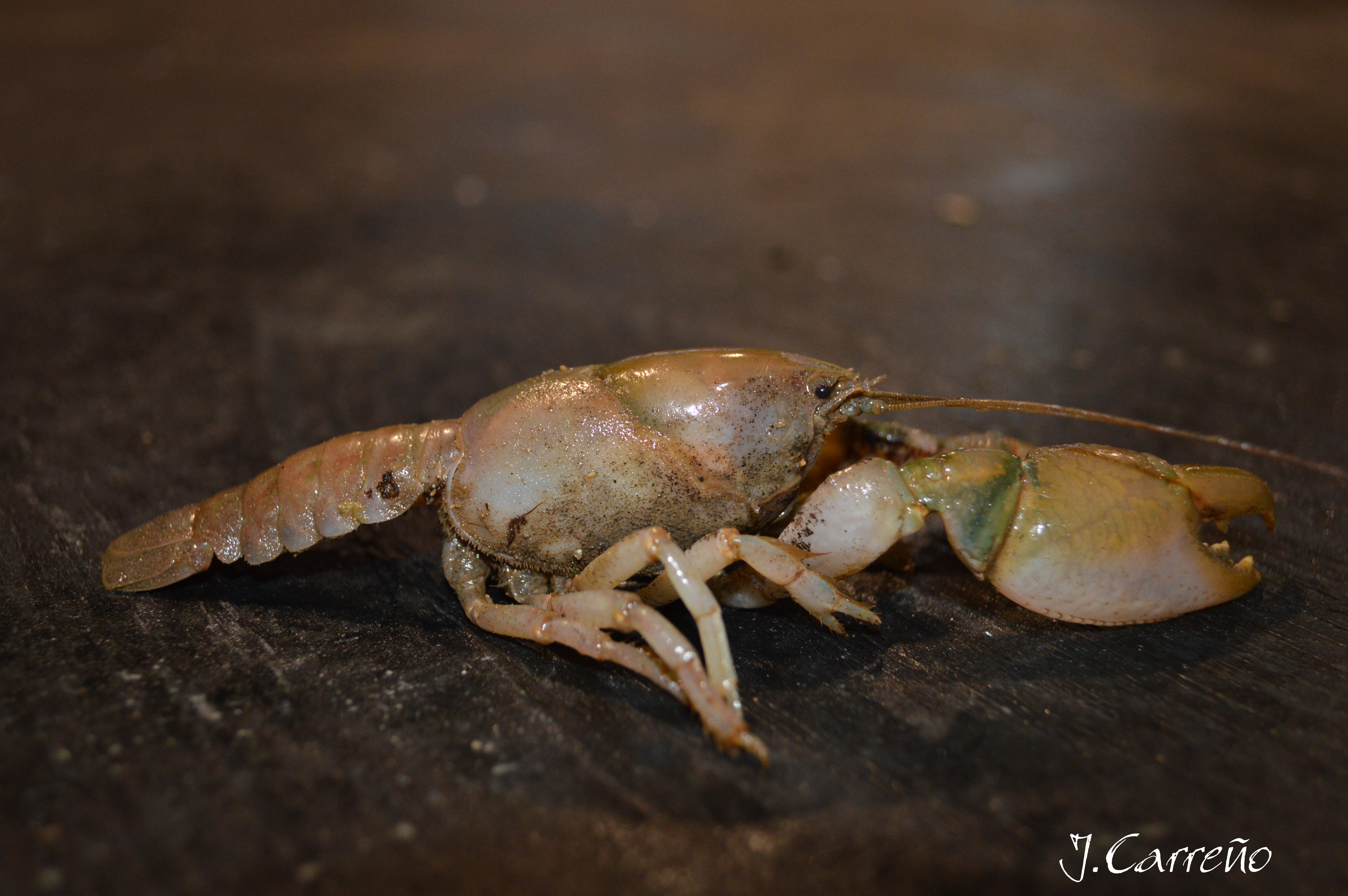 camaron excavador, camaron de vega